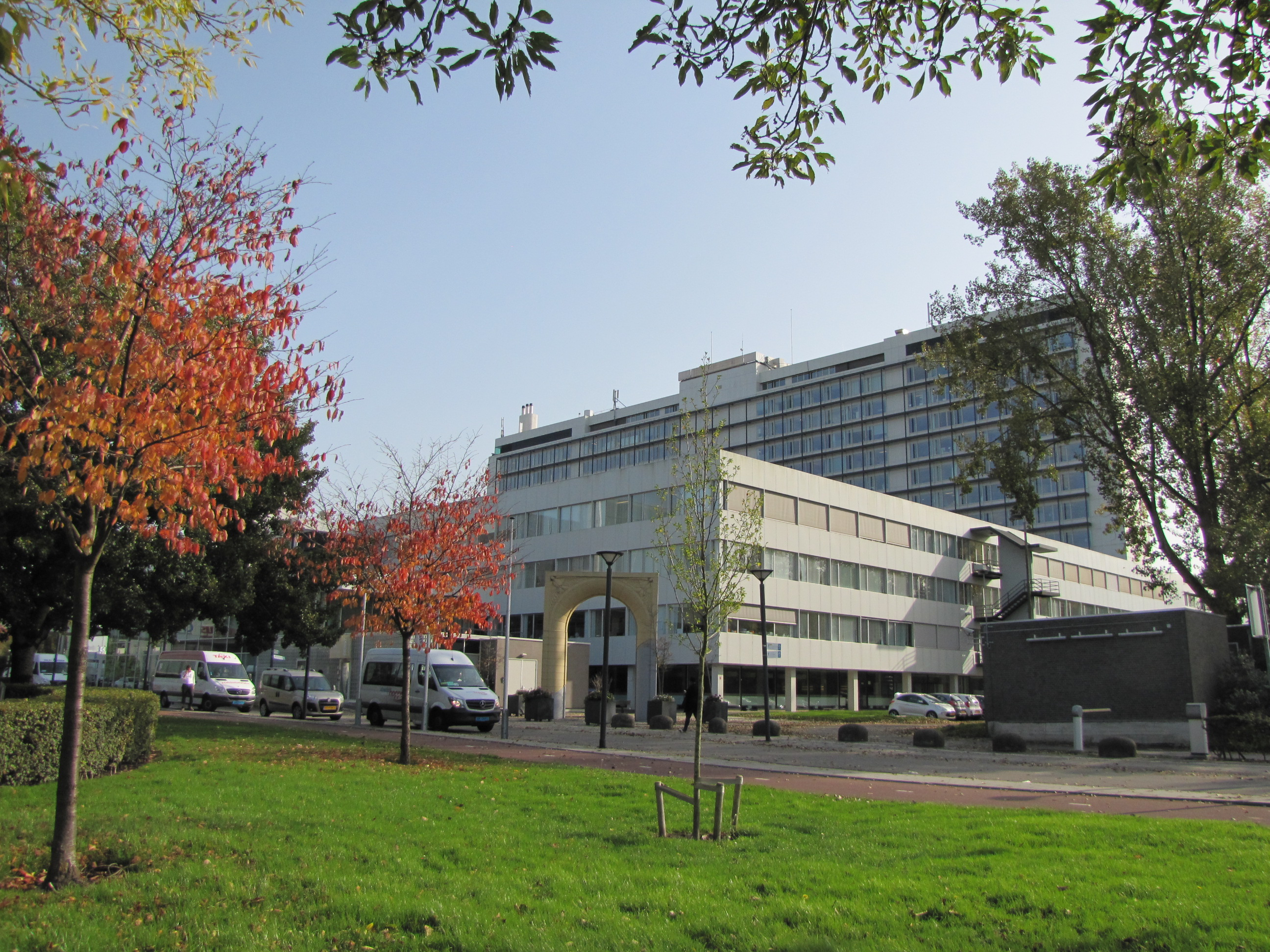 Hôpital St Franciscus, à Rotterdam, 2017. Façade sud (entrée pour visites de jour).